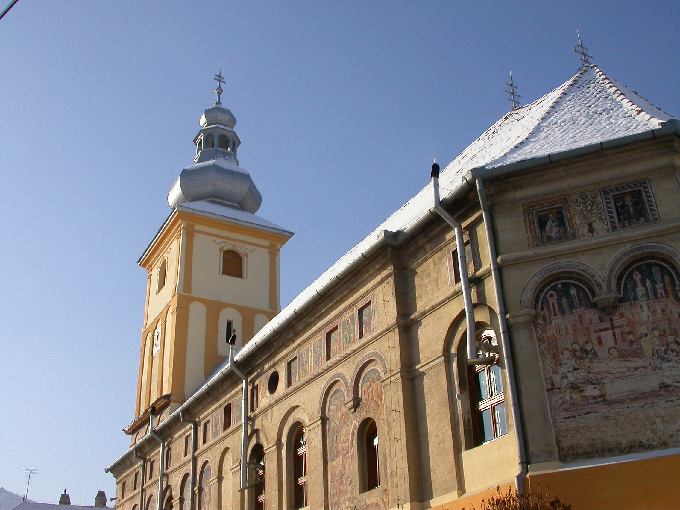 Biserica "Cuvioasa Paraschiva", 1725 - 1758